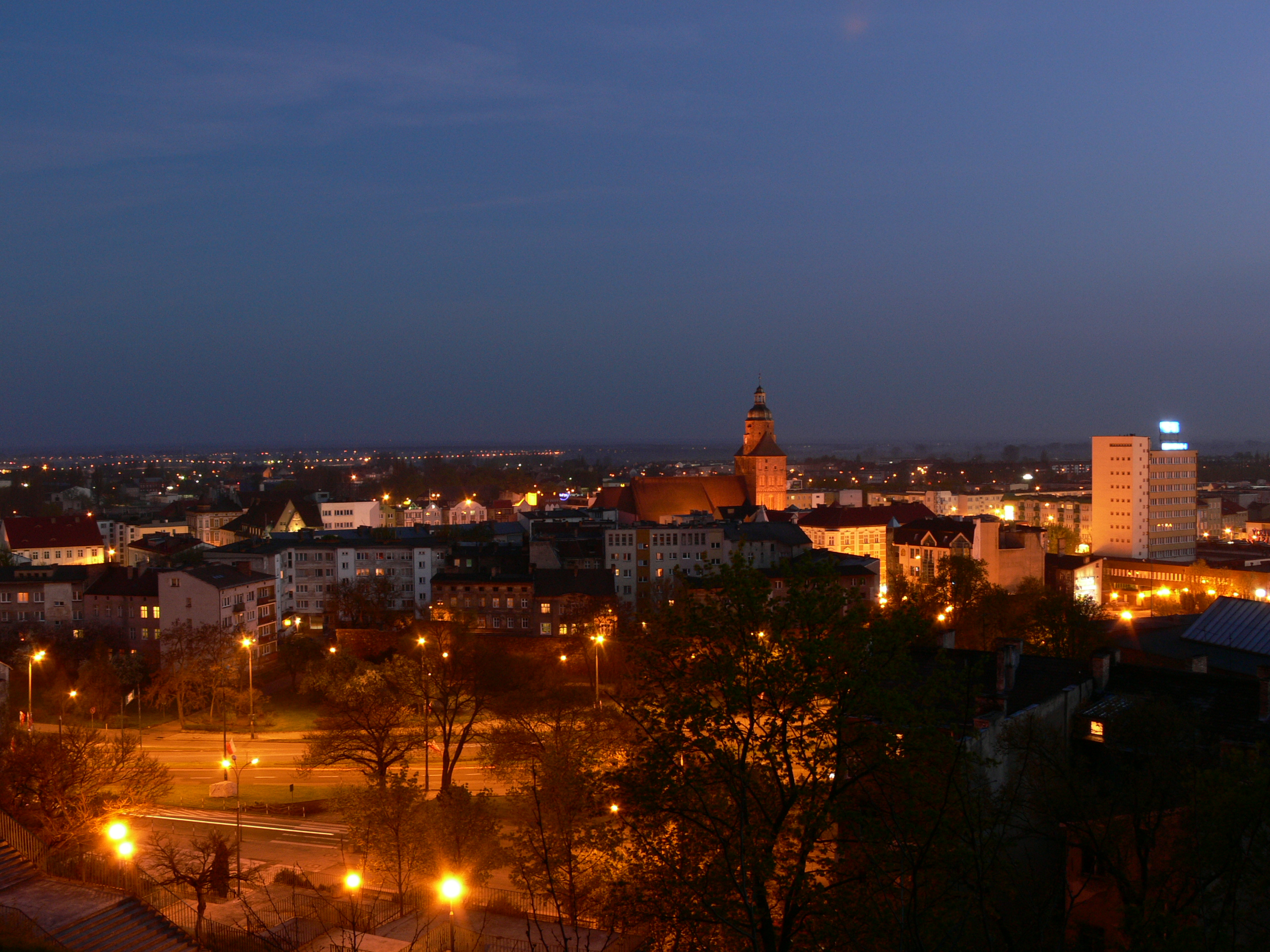 Gorzów - Widok ogólny z platformy widokowej w Parku im.Henryka Siemiradzkiego Autor : Bartek Wawraszko